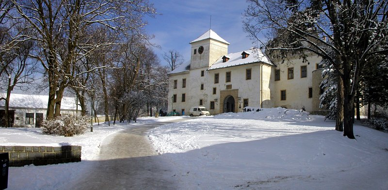 foto scattata da Stanislav Mrazek e donata a Wikipedia in GFDL Categoria:Immagini esclusivamente in GNU FDL